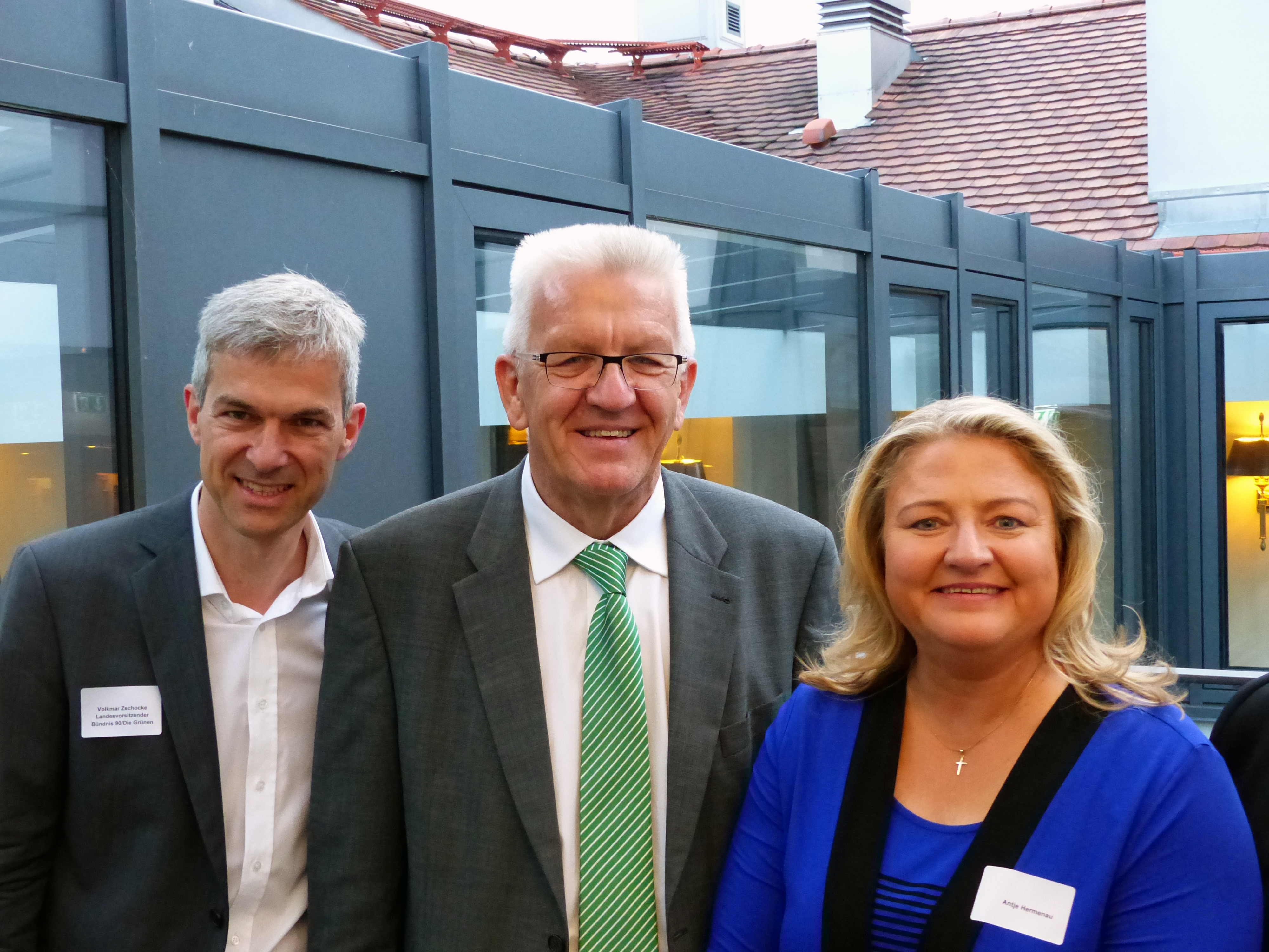 Volkmar Zschocke, Landesvorsitzender von Bündnis 90/Die Grünen in Sachsen zusammen mit Winfried Kretschmann, Ministerpräsident von Baden-Württemberg, und Spitzenkandidatin Antje Hermenau in Dresden am 22. August 2014